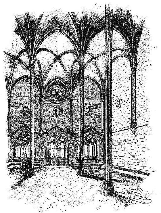 Dibuix de la sala capitular del convent de Sant Doménec de València de J. J Zapater (1867-1922). Fet per a il·lustrar el llibre València de Teodor Llorente.